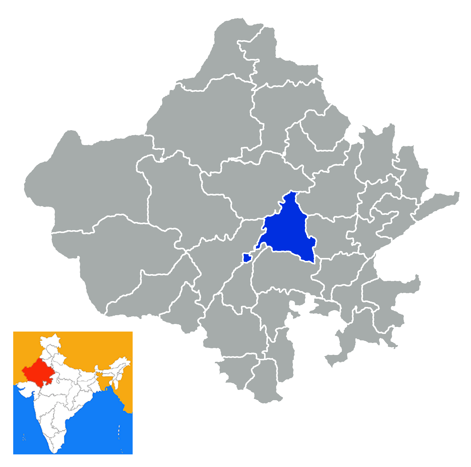 Distrito de Ajmer Rajastan India